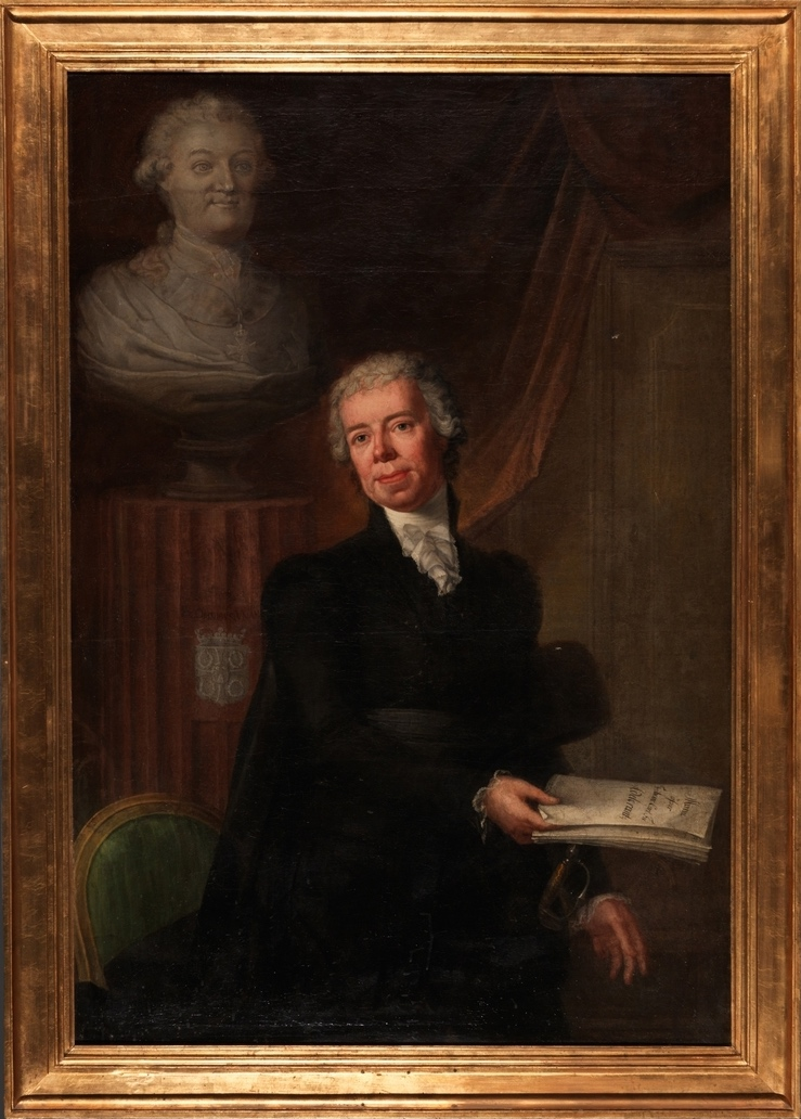 Porträtt av arkitekten Thure Wennberg. Wennberg är iklädd nationella dräkten, och bär förgylld värja. I sin hand håller han det minnestal han höll över Carl Fredrik Adelcrantz i Konstakademien 1796. Bakom Wennberg syns på en kolonn en porträttbyst av Adelcrantz, och kolonnen bär även dennes adelsvapen. Målning målades 1805 av Anders Hansson. Tavlan tillhör Nordiska museet.